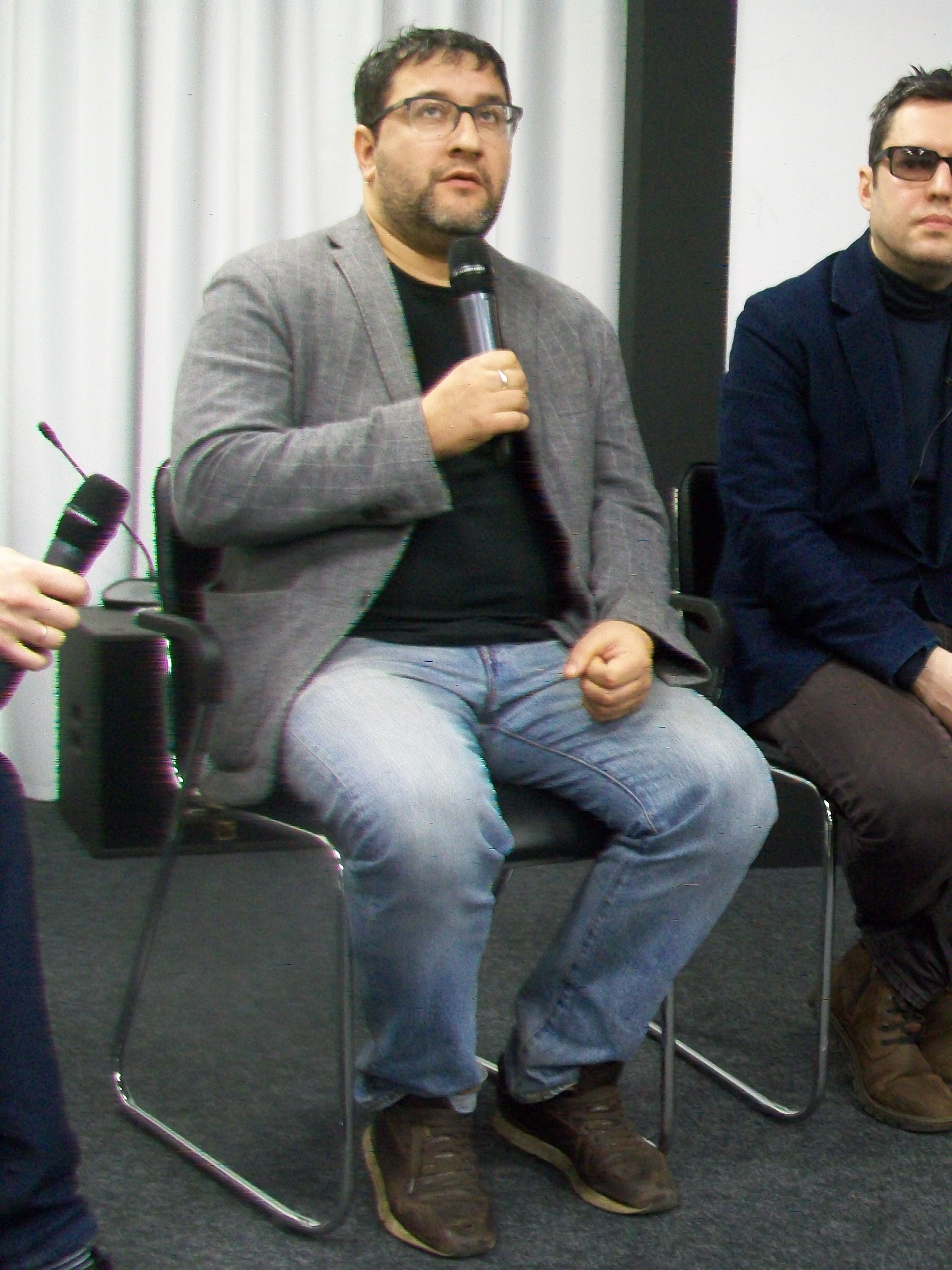 Александр Котт в Ельцин-центре на презентации фильма "Троцкий". 23 декабря 2017 года